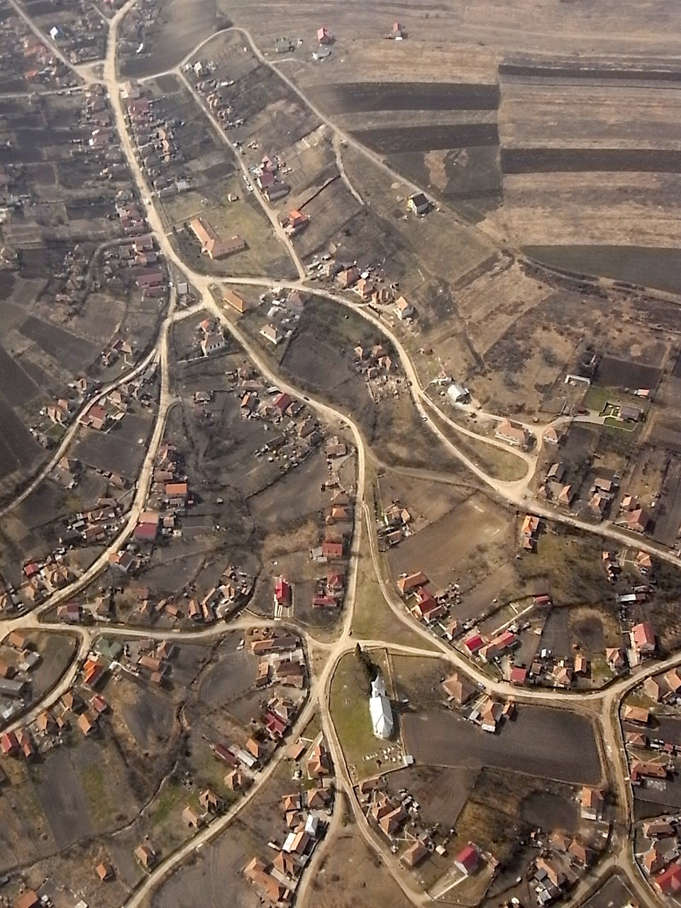 Dezmir (judetul Cluj), fotografie aeriană